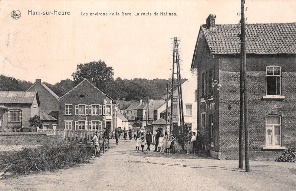 Les environs de la gare et l'actuel chemin du Hameau à Ham-sur-Heure